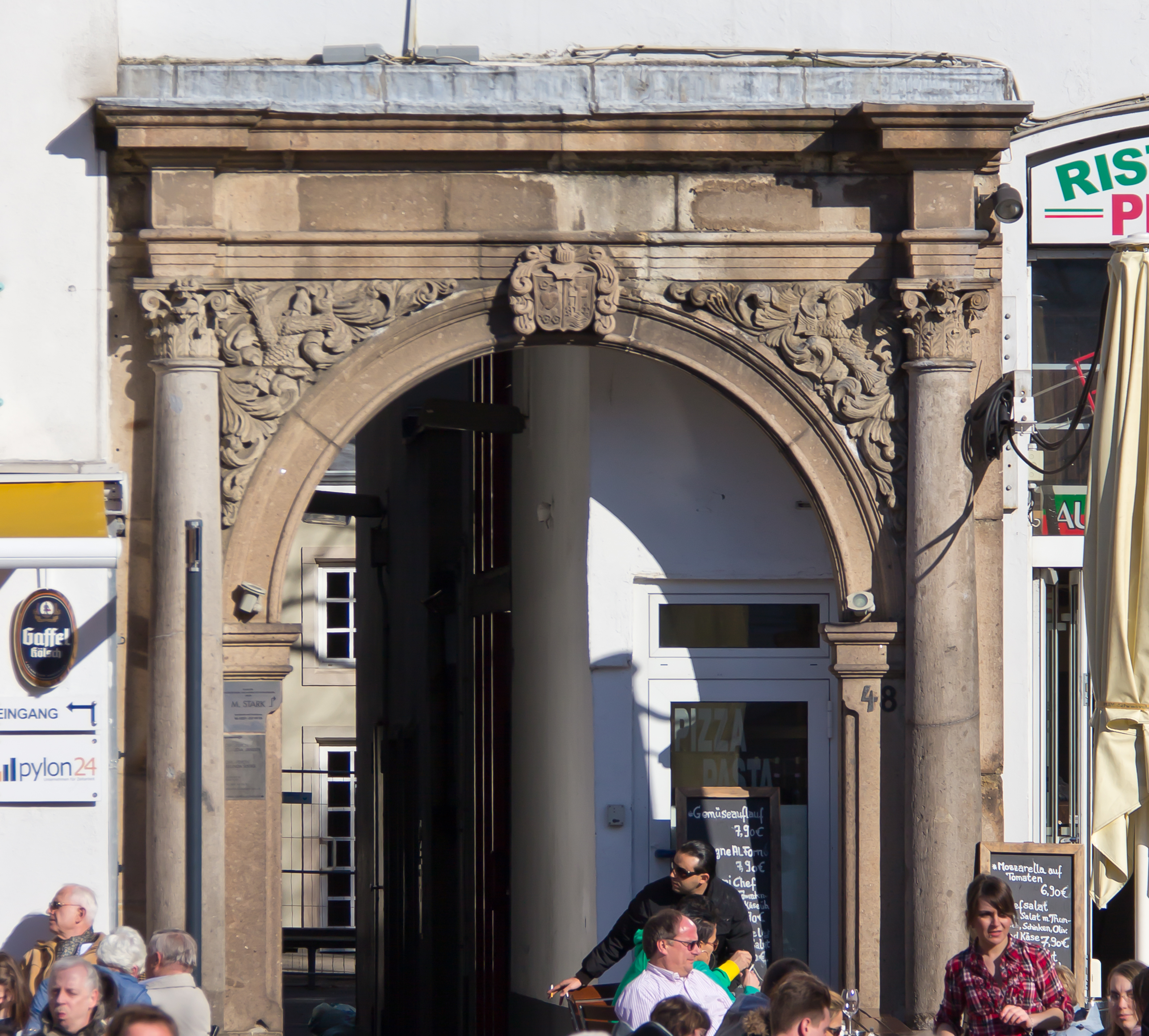 Denkmalgeschütztes Portal am Haus Heumarkt 48, Köln